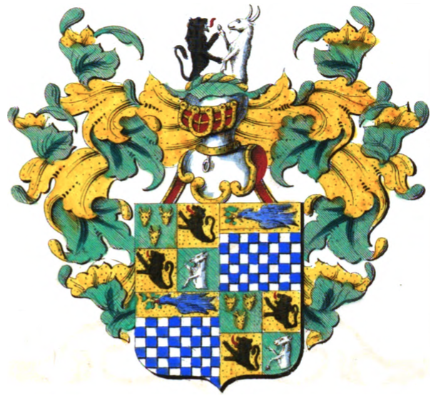 Armoiries de la famille Limnander de Nieuwenhove